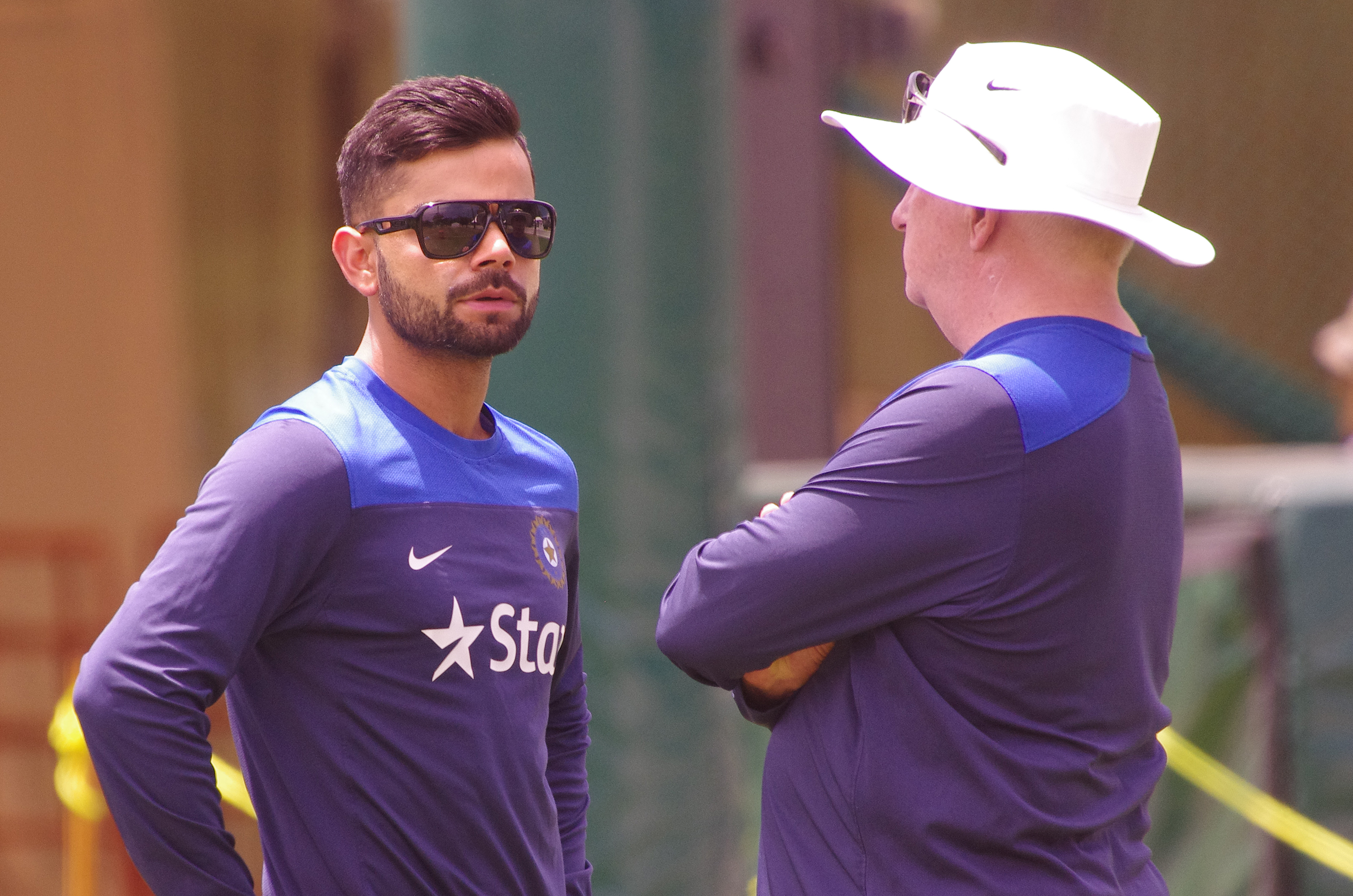 VIRAT KHOLI & DUNCAN FLETCHER